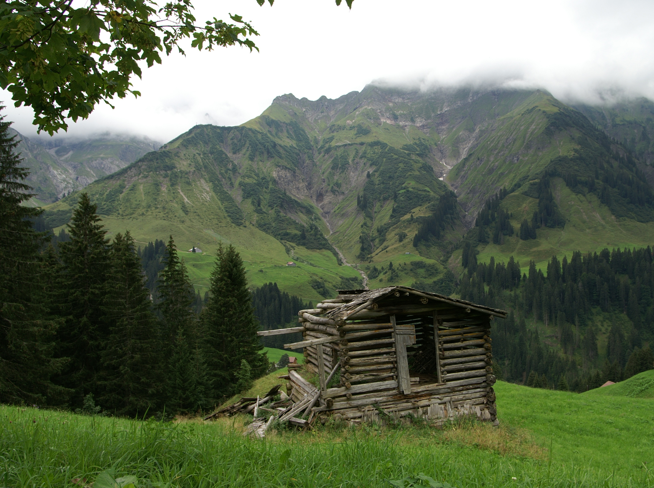 Heuhütte oberhalb von Schröcken im Bregenzerwald , Vorarlberg